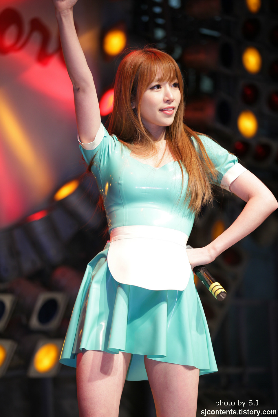 코코소리(COCOSORI) 신인발굴프로젝트 동대문 밀리오레